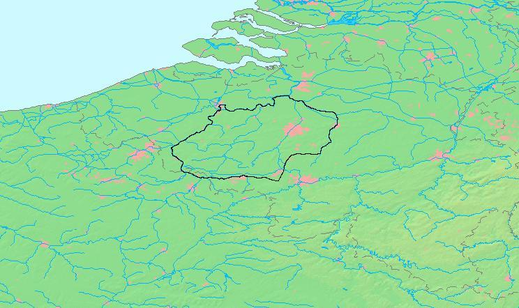 Limites approximatives du pagus primitif de Brabant, d'après Léon Vanderkindere, La Formation territoriale des principautés belge au Moyen Âge.